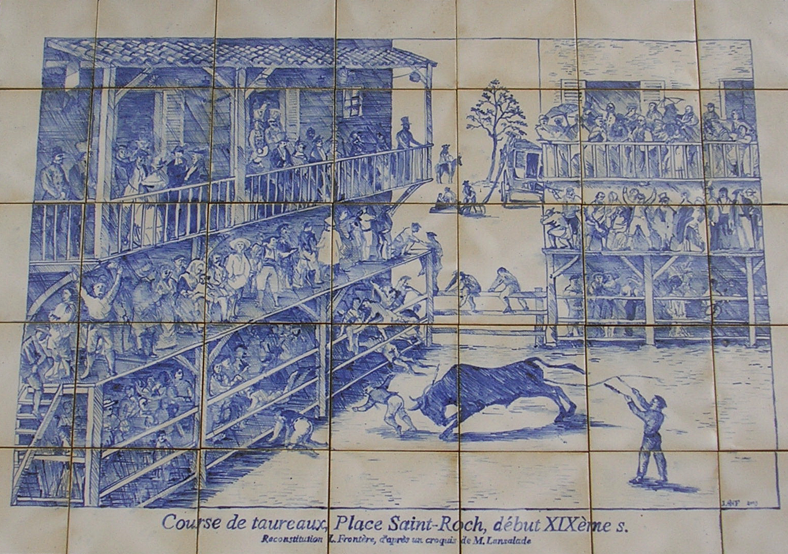 Faïence sur un mur de la place Saint-Roch à Mont-de-Marsan (Landes, France) représentant cette même place au XIXe siècle lorsqu'elle accueillait les courses de taureaux espagnoles. Reconstitution réalisée par L.Frontère, d'après un croquis de M.Lansalade.